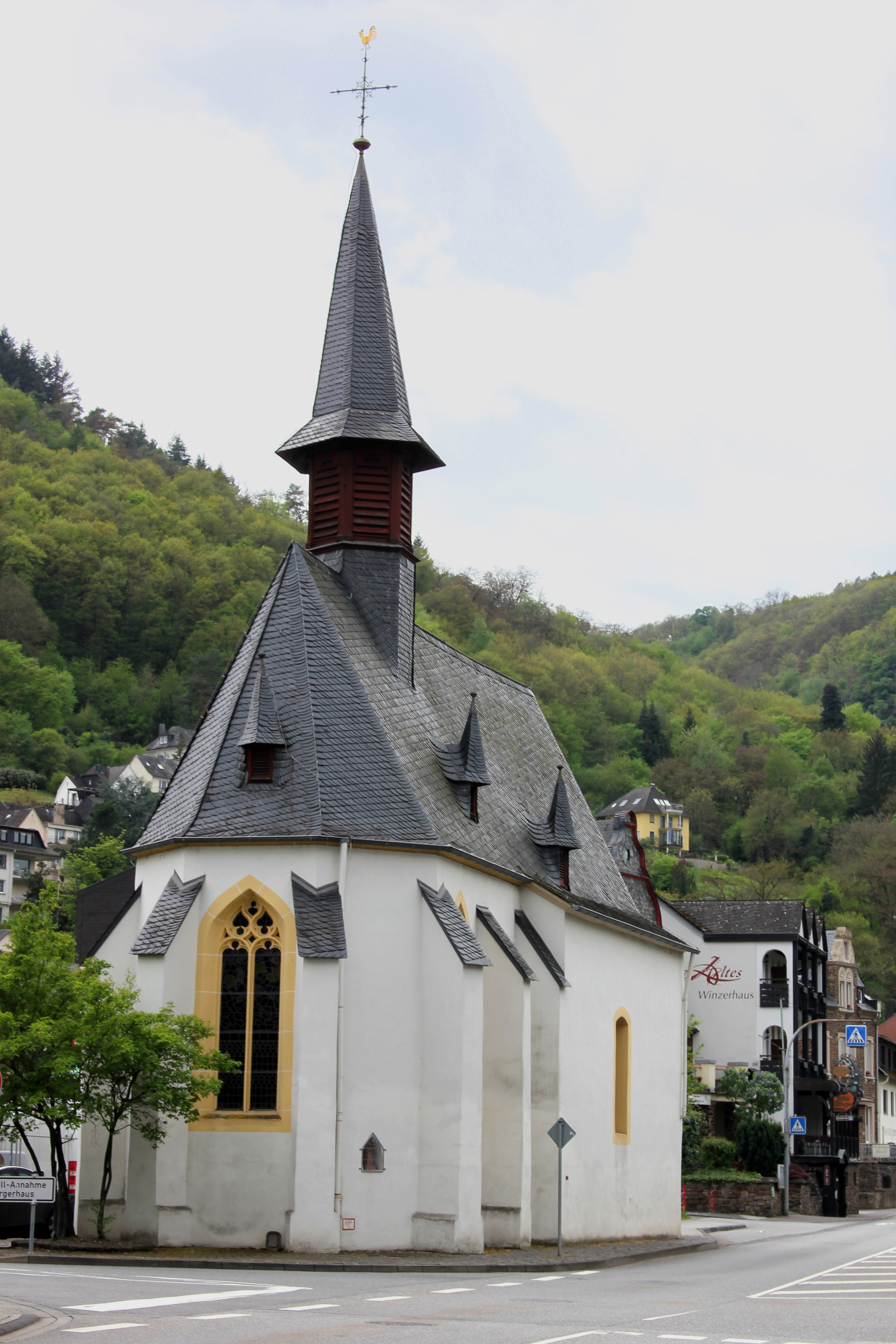 Antoniuskapelle in Cochem-Seel, Chor aus dem 15. Jahrhundert